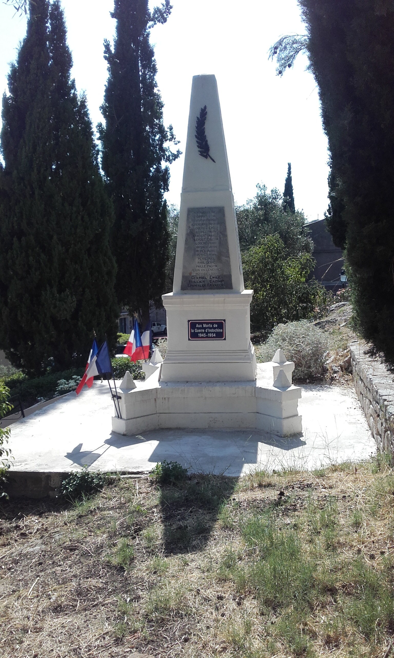 Var, Flayosc, Monument aux morts : Aux morts de la Guerre d'Indochine 1945-1954